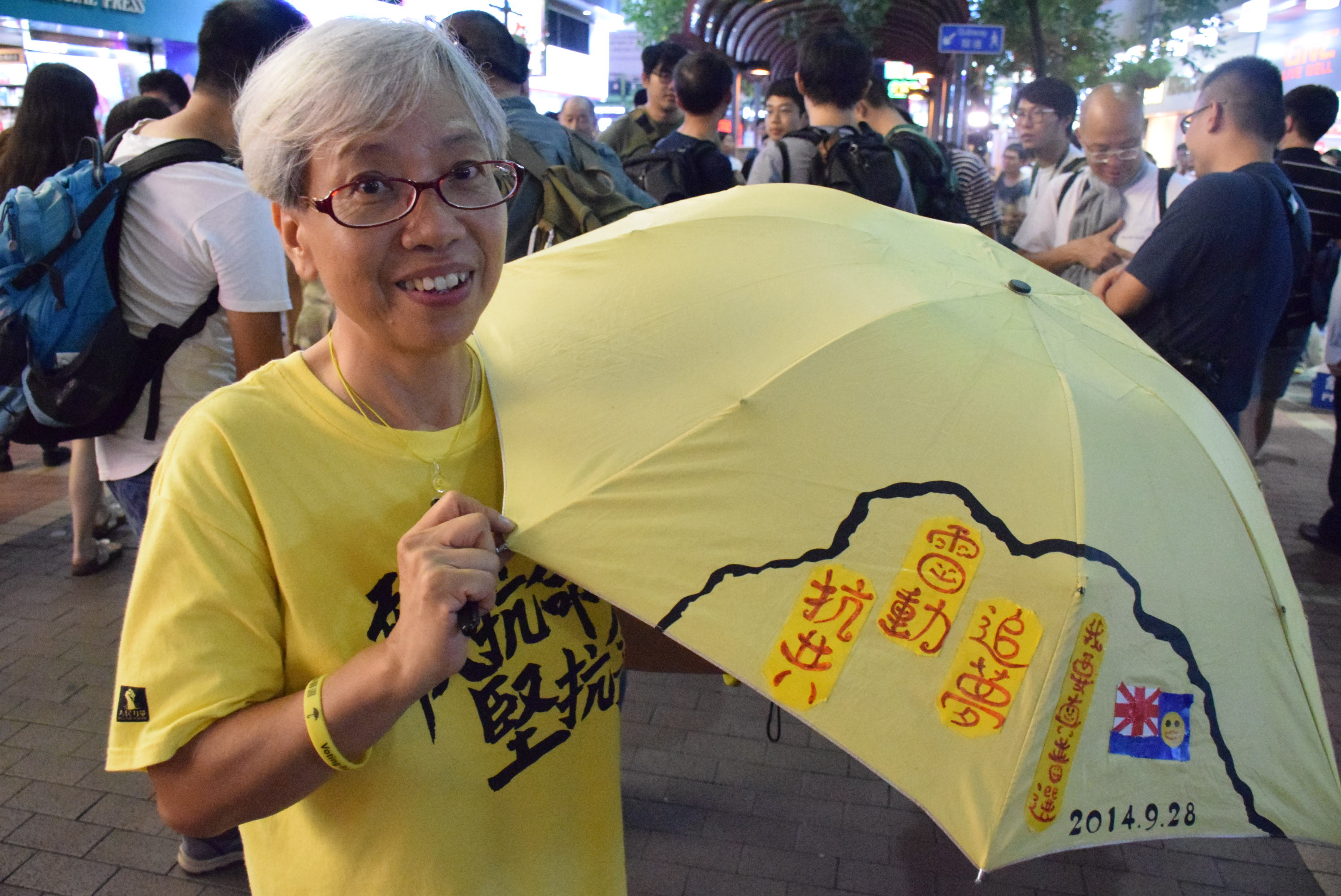 粵語: 王鳳瑤，人稱王婆婆